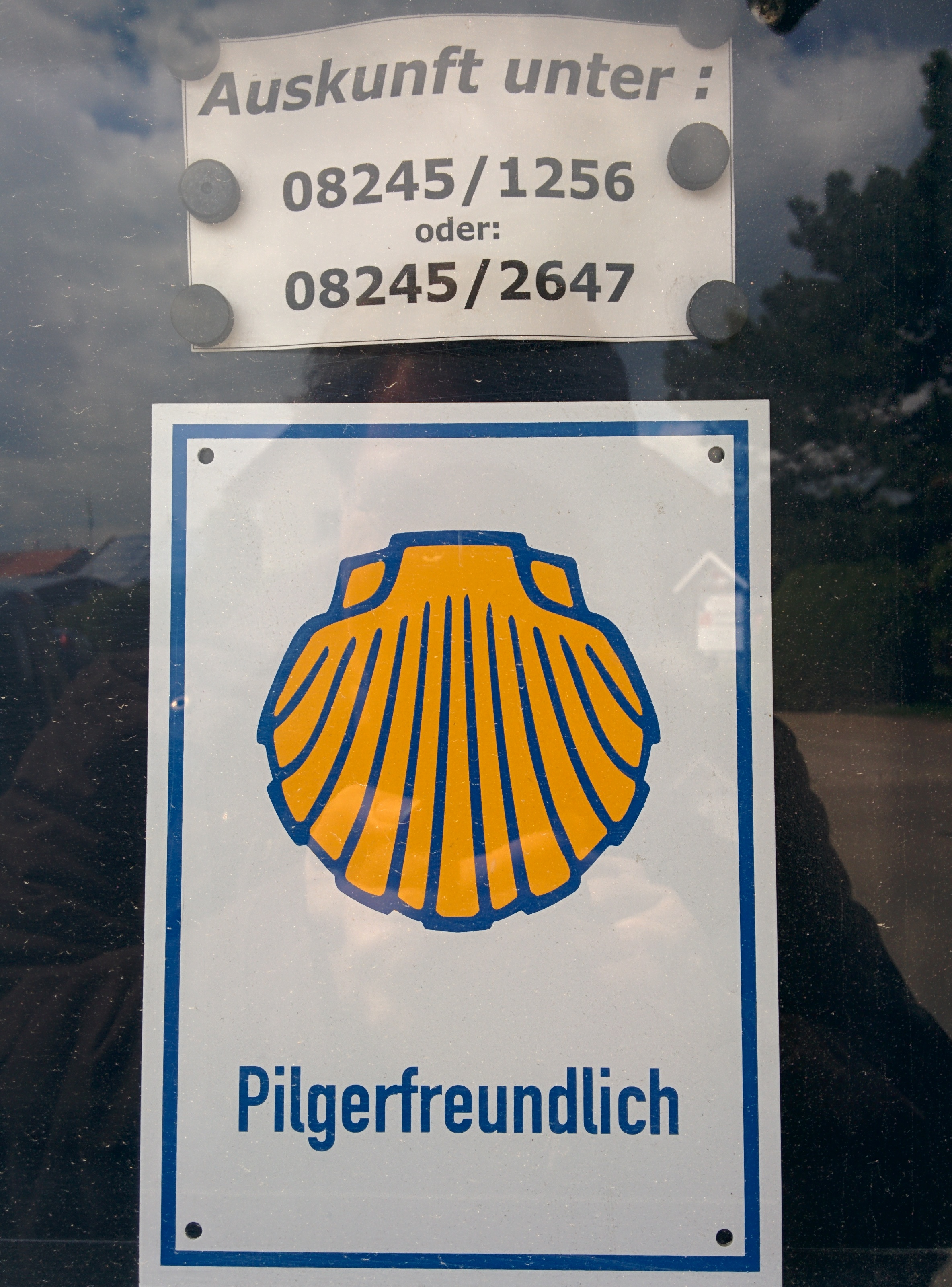 Schild einer pilgerfreundlichen Herberge auf dem bayrisch-schwäbischen Jakobsweg in Türkheim, Landkreis Unterallgäu